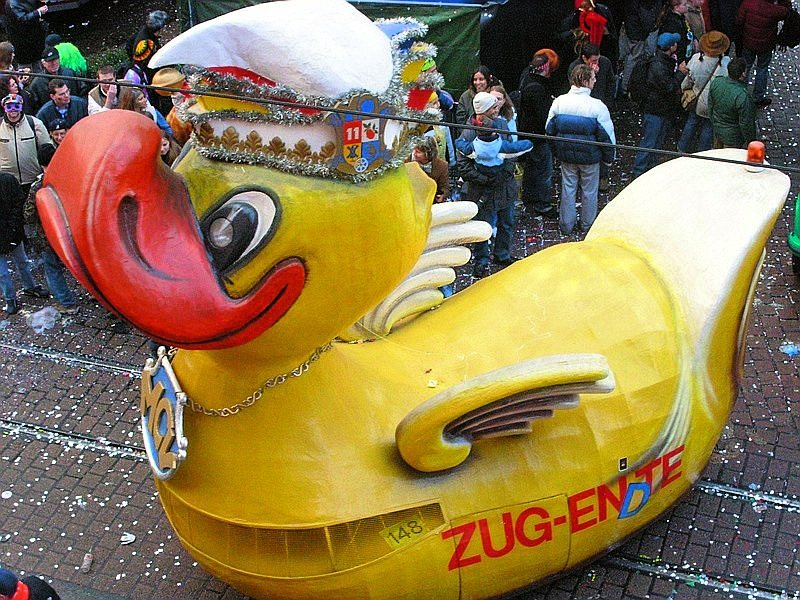 Mainzer Fastnacht: "Rosenmontagszugs-Ente" am Rosenmontag 2004.